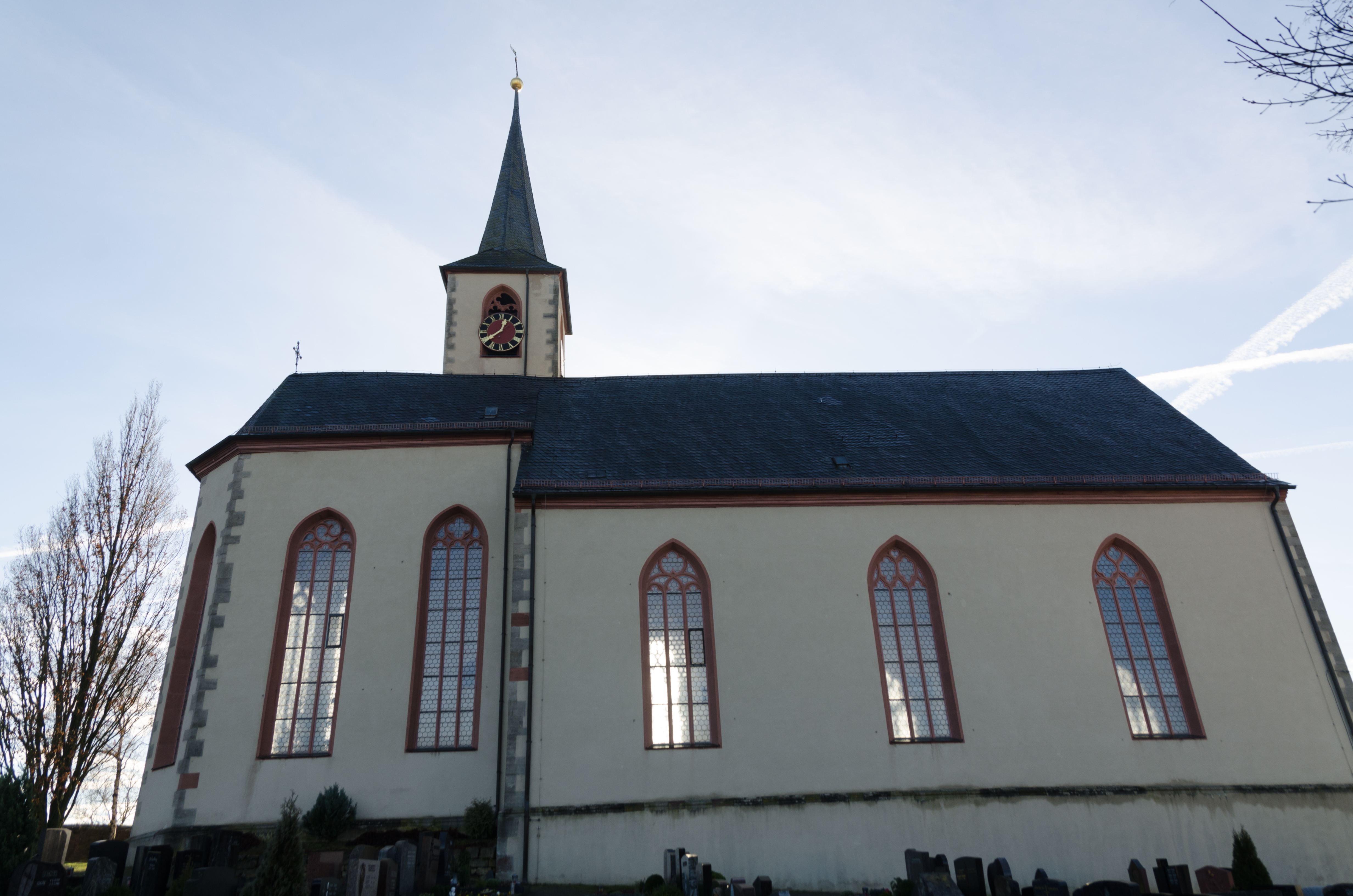 Eußenheim, Katholische Pfarrkirche St. Petrus und Marcellinus, Exterior